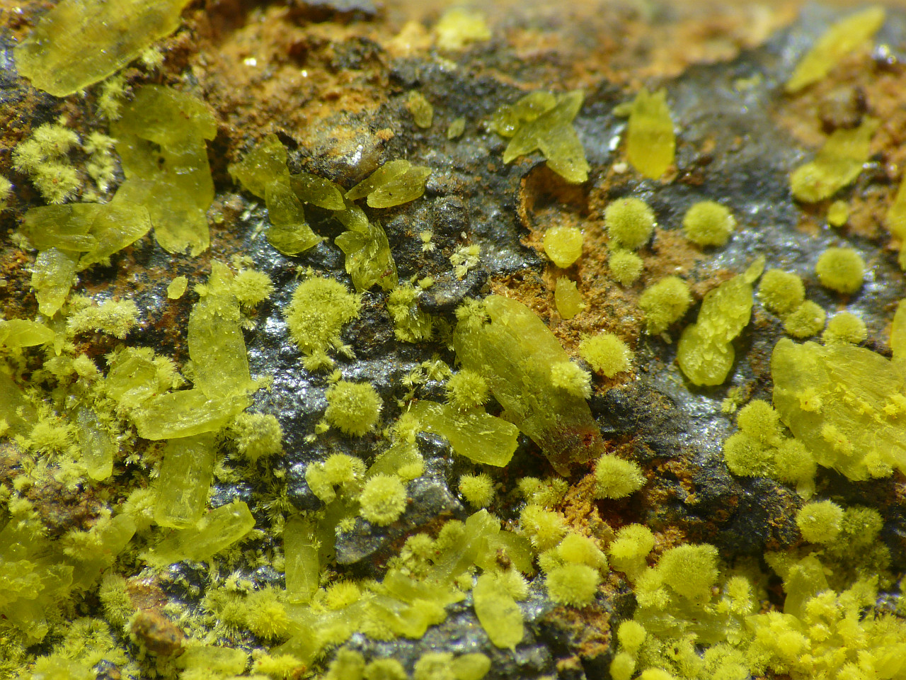 prismatisches Grimselit & kugeliges Cejkait, Rovnost Mine, Jachymov, Tschechische Rep., FOV: 6mm